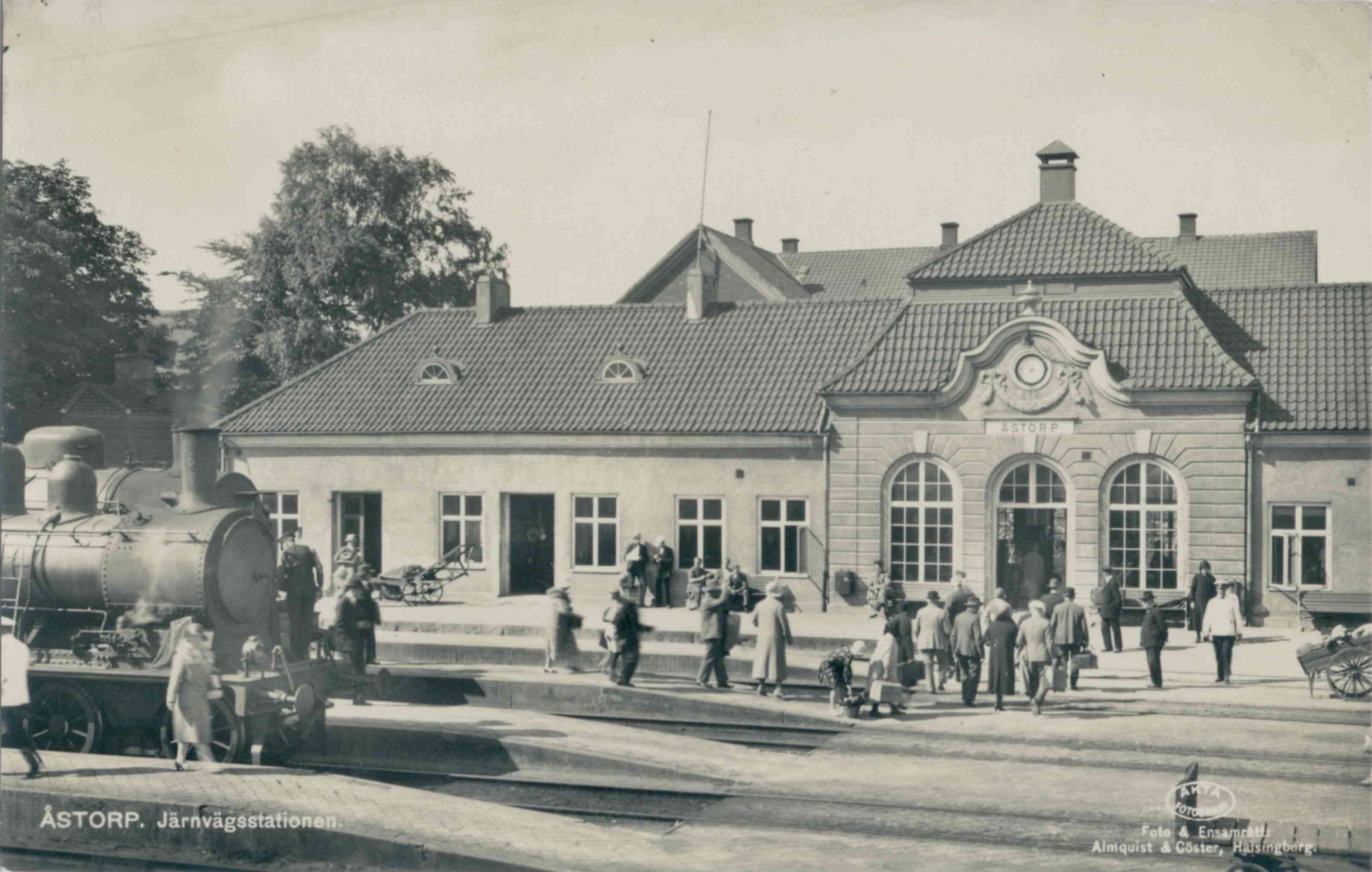 Åstorp. Järnvägsstationen. Fotograf: Almquist & Cäster, Hälsingborg Förlag: Möllers Bokhandel Övrigt: Äkta Fotografi